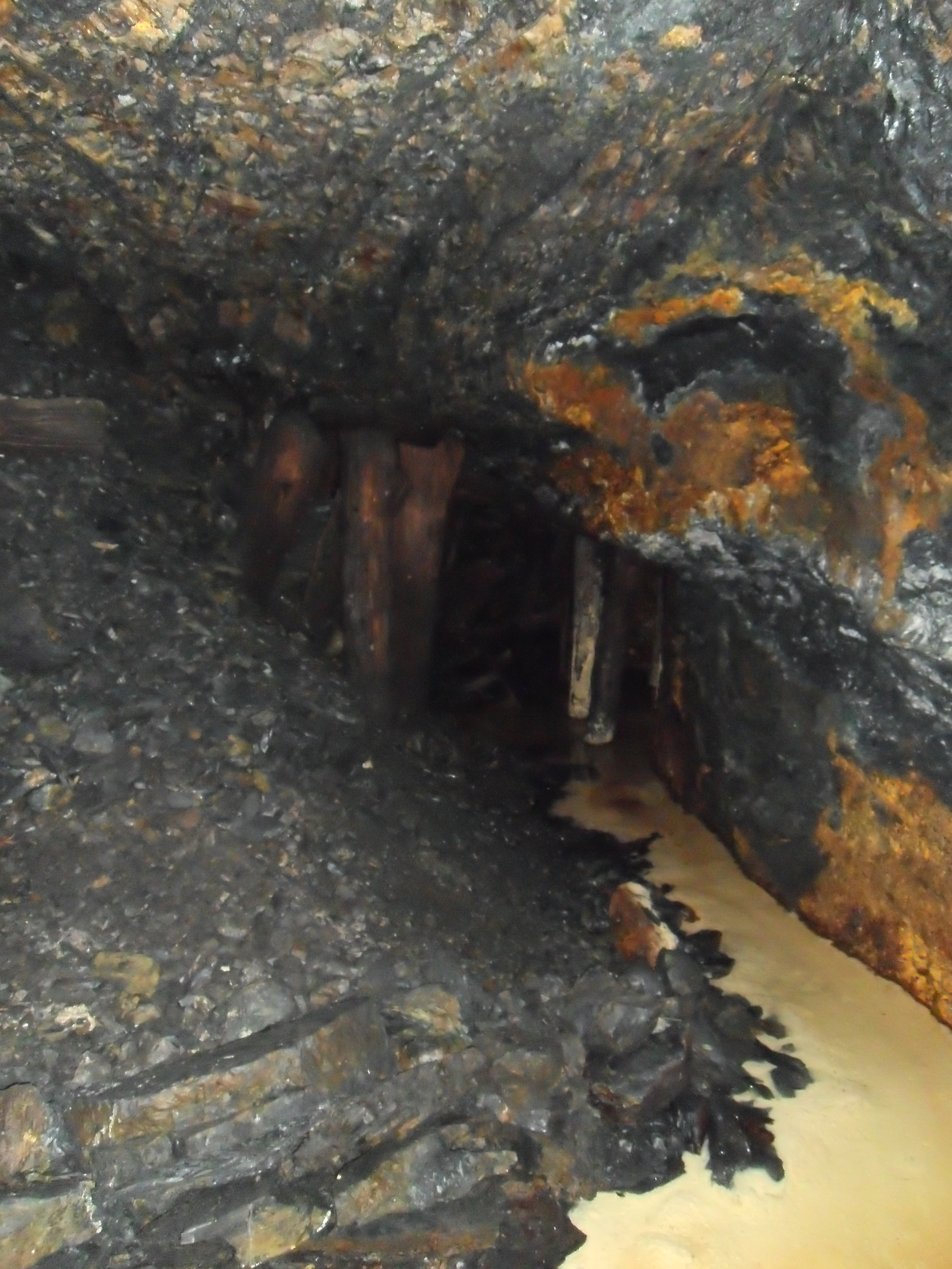 Schaubergwerk Morassina